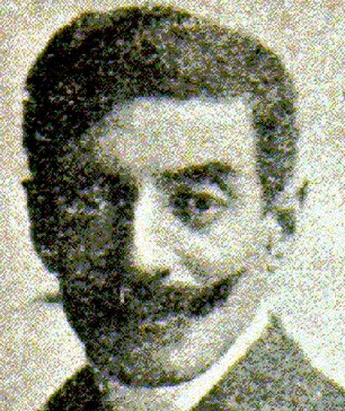 Fotografia di Millo Bortoluzzi